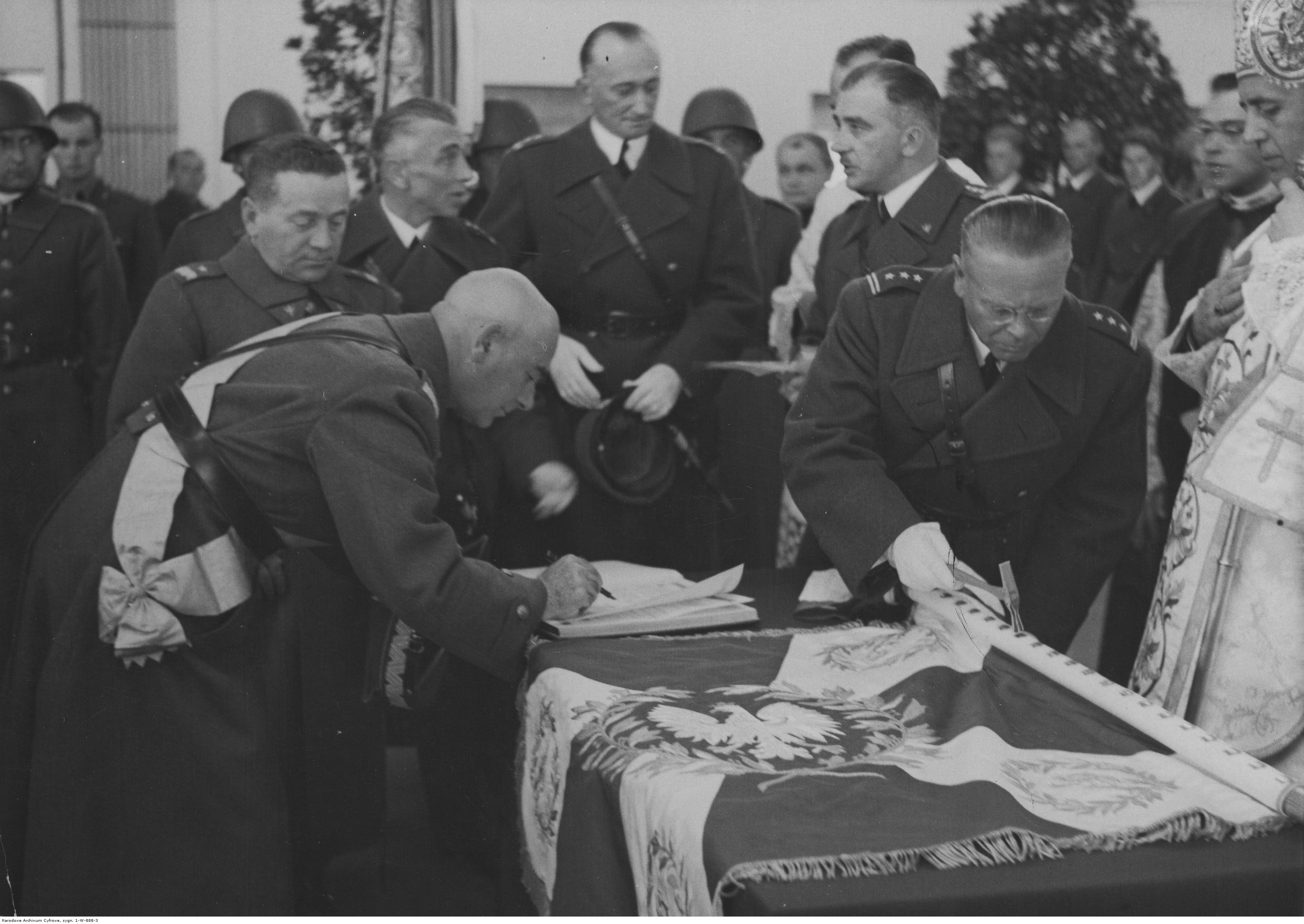 X-lecie Szkoły Podchorążych Lotnictwa w Dęblinie. Marszałek Edward Rydz-Śmigły wpisuje się do księgi pamiątkowej, po wbiciu gwoździa w drzewce chorągwi, Obok wspomnianej czynności dokonuje komendant szkoły płk pil. Wacław Iwaszkiewicz. Koncern Ilustrowany Kurier Codzienny - Archiwum Ilustracji. Sygnatura: 1-W-888-3